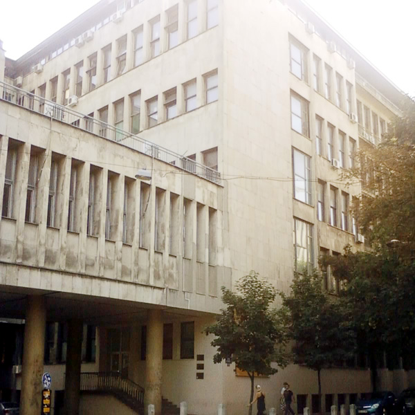 Фотографија Факултета за физичку хемију.